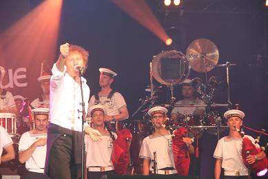 Bagad de Lann Bihoue concert anniversaire Lorient 2007